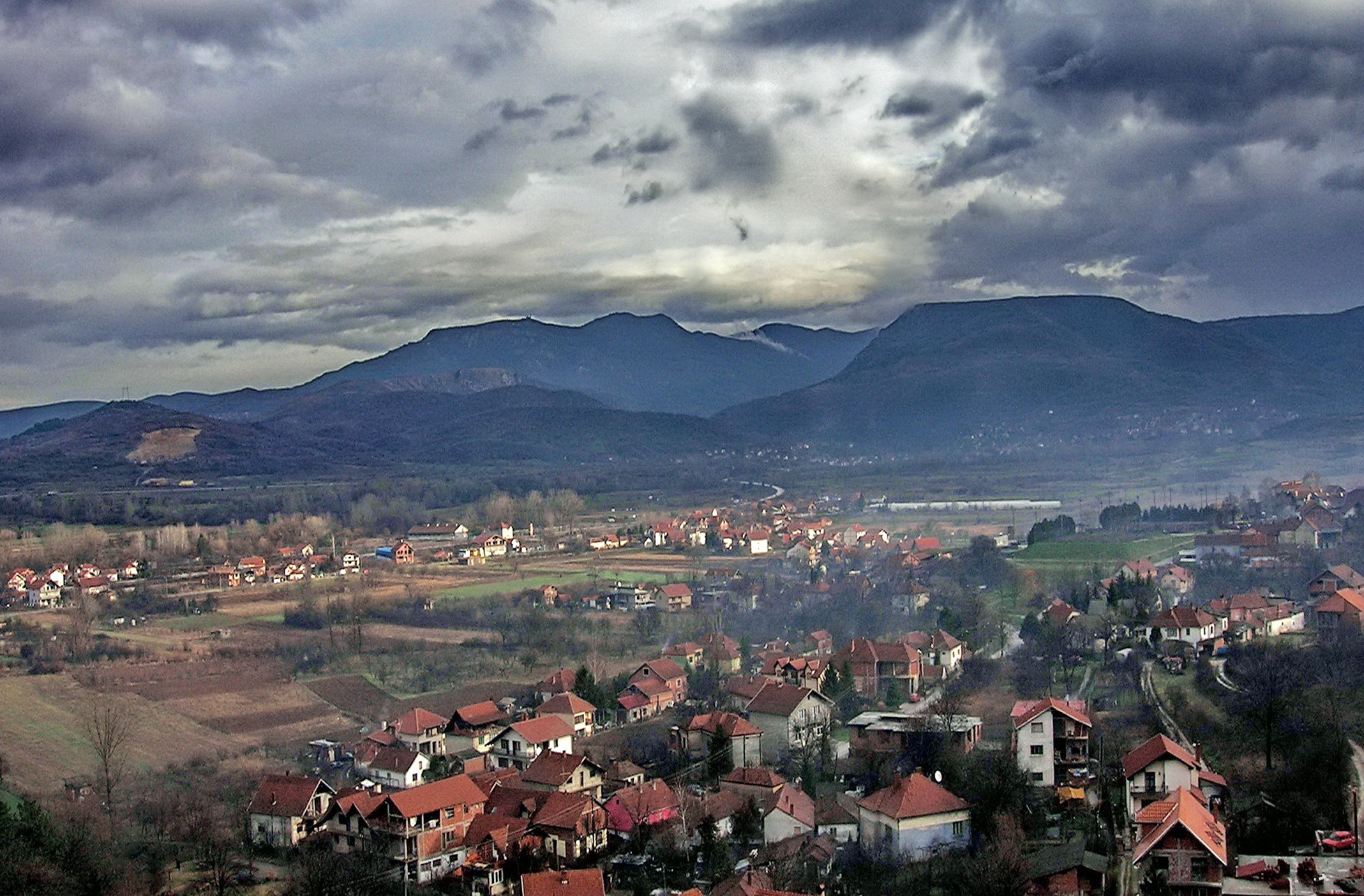 Niška Banja, pogled prema obroncima Suve planine i zapadnog ulaza u Sićevačku klisuru